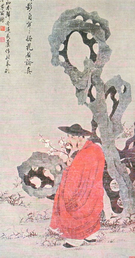 Portrait de Yi-an, ami de l'artiste, daté 1798, par le peintre chinois Luo Ping. (1733-1799), Rouleau vertical, (rogné aux extrémités supérieure et inférieure), encre et couleurs légères sur papier, L.44cm. Washington.